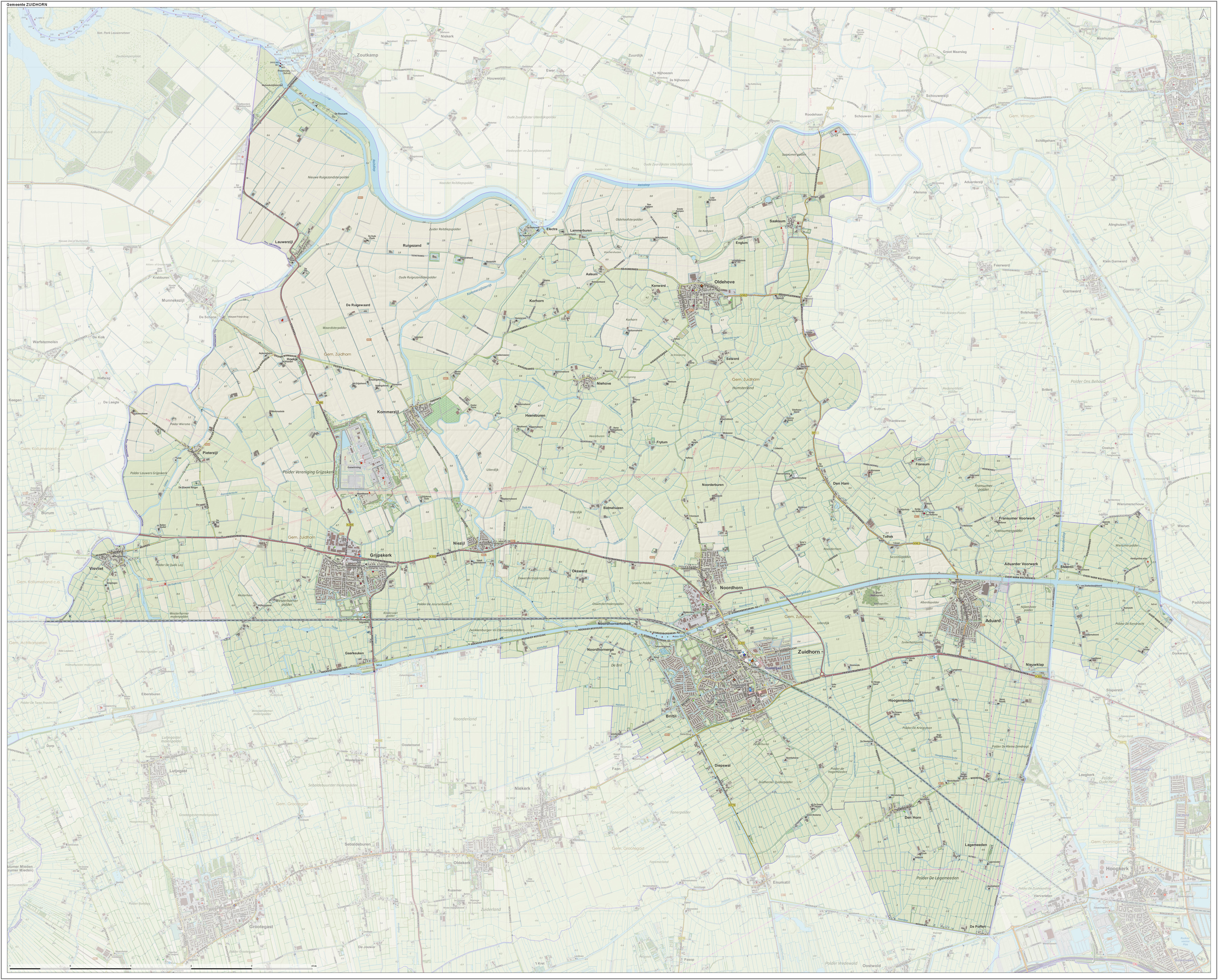 Topografische gemeentekaart. Resolutie: 400 pixels/km. Kaartbeeld samengesteld uit de open geodata van de Top10NL en Top25namen (Kadaster), Creative Commons-BY licentie. Gebouwvlakken uit open geodata BAG extract. Wegen uit de OpenStreetMap, OpenStreetMap community. Reliëfschaduw uit de Actuele Hoogtekaart AHN2. Samenstelling en kleurenschema: Jan-Willem van Aalst, met QGIS. Zie ook de Legenda.